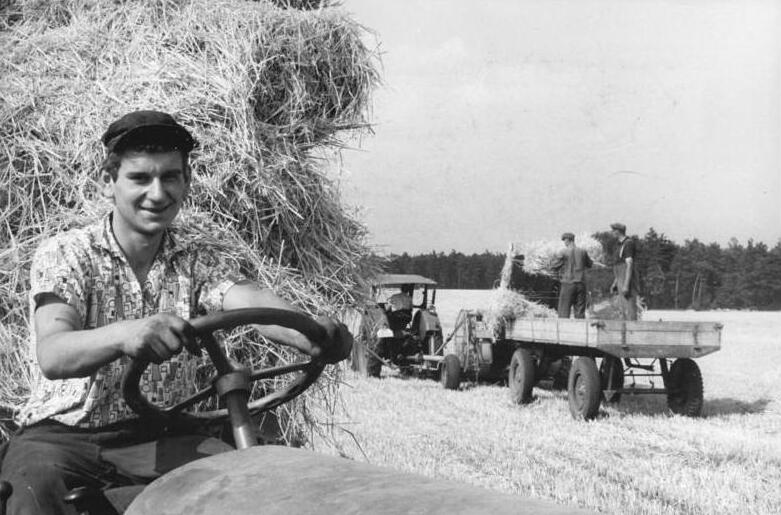 LPG Siegadel, Ernte, Erntehelfer Zentralbild Schutt Nl-At. 26.7.1964 Bezirk Cottbus: Die Felder so schnell wie möglich zu räumen. sind auch die Genossenschaftsbauern der LPG "Frieden" in Siegadel, Kreis Lübben, bemüht, Werner Schmidtchen (unser Bild) - er arbeitet als Elektriker in einer PGH - hilft in seinem Urlaub den Genossenschaftsbauern bei der Ernte.